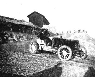 Henri Rougier, vainqueur de la course de côte du Mont Ventoux 1904 sur Turcat-Mery, Paris-Vienne 1902 - contrôle de Belfort Histoire de l'automobile, Pierre Souvestre, éd. H. Dunod et E. Pinat, 1907 (ASIN B001BPBE58) P.621